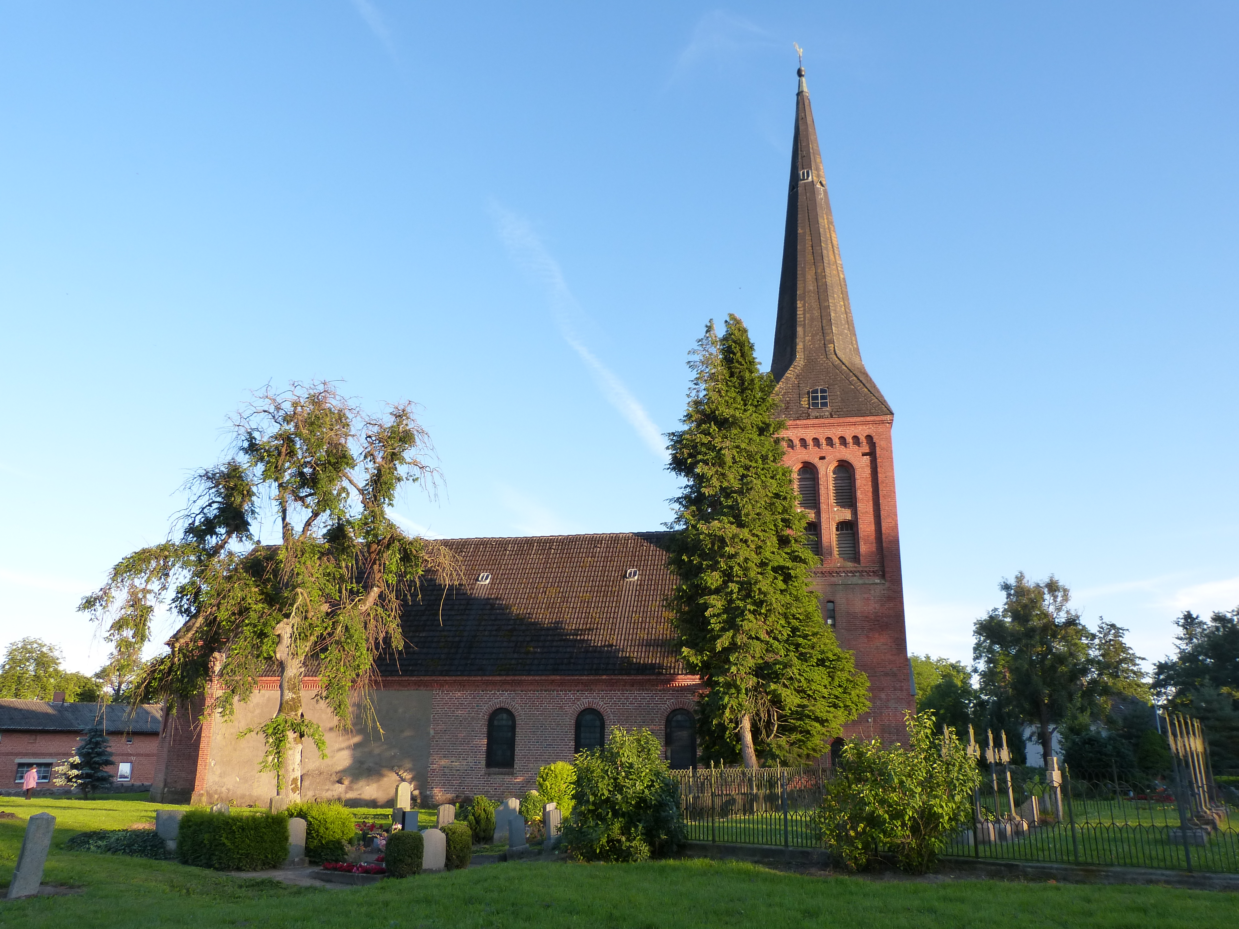 Kirche in Gültz, Nordseite